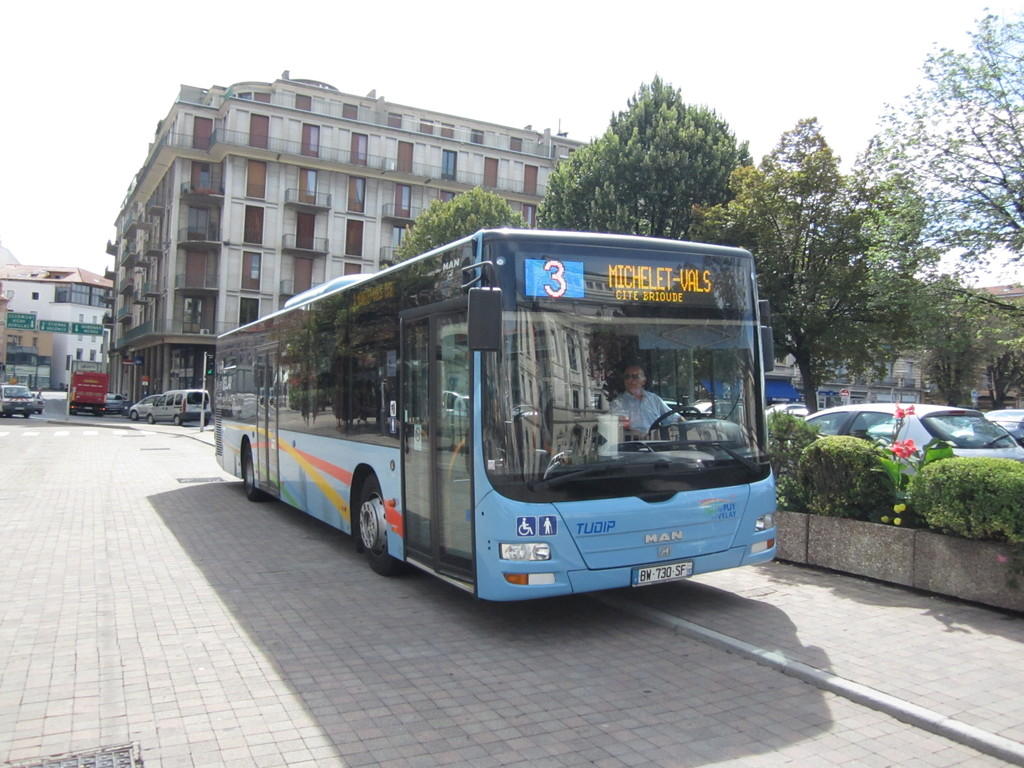 MAN Lion's City de la ligne 3 du réseau TUDIP au Puy-en-Velay, sur la Place Michelet.